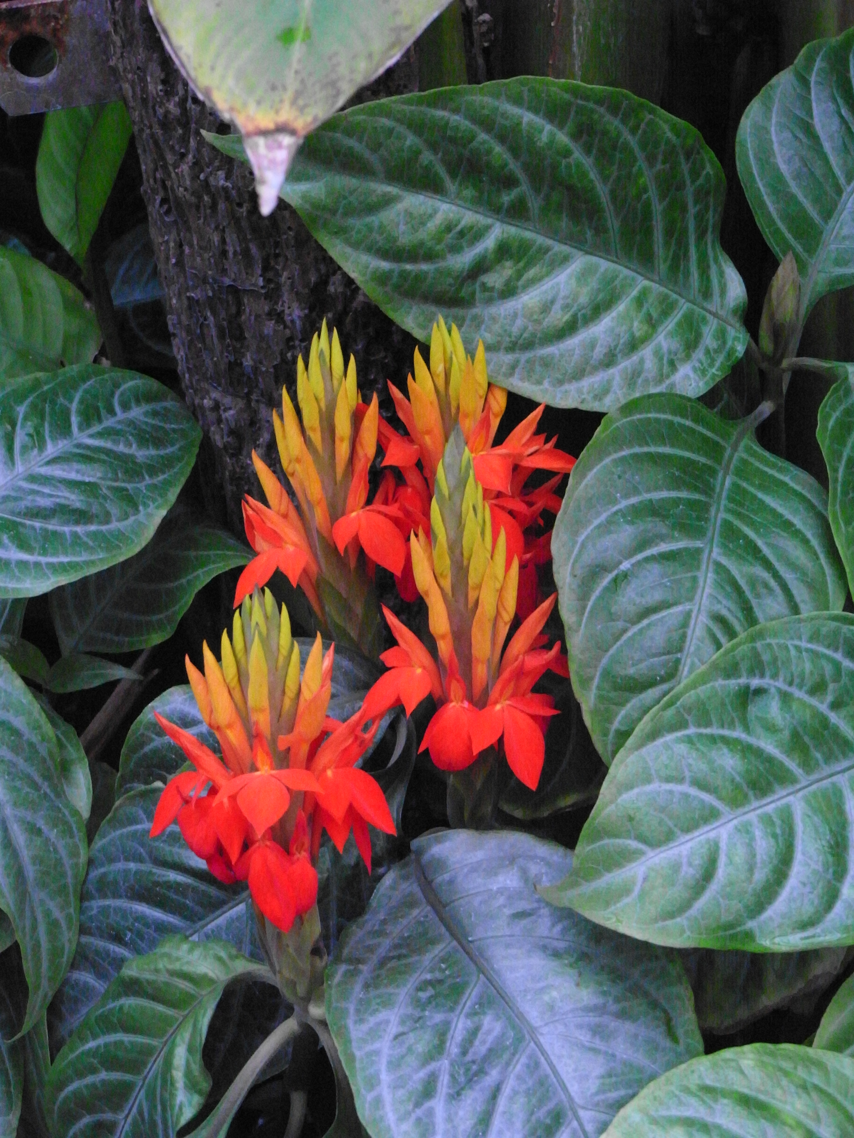 綺麗な炎のグラデーション。